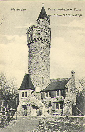 Wiesbaden: Der Kaiser Wilhelm II.-Turm auf dem Schläferskopf